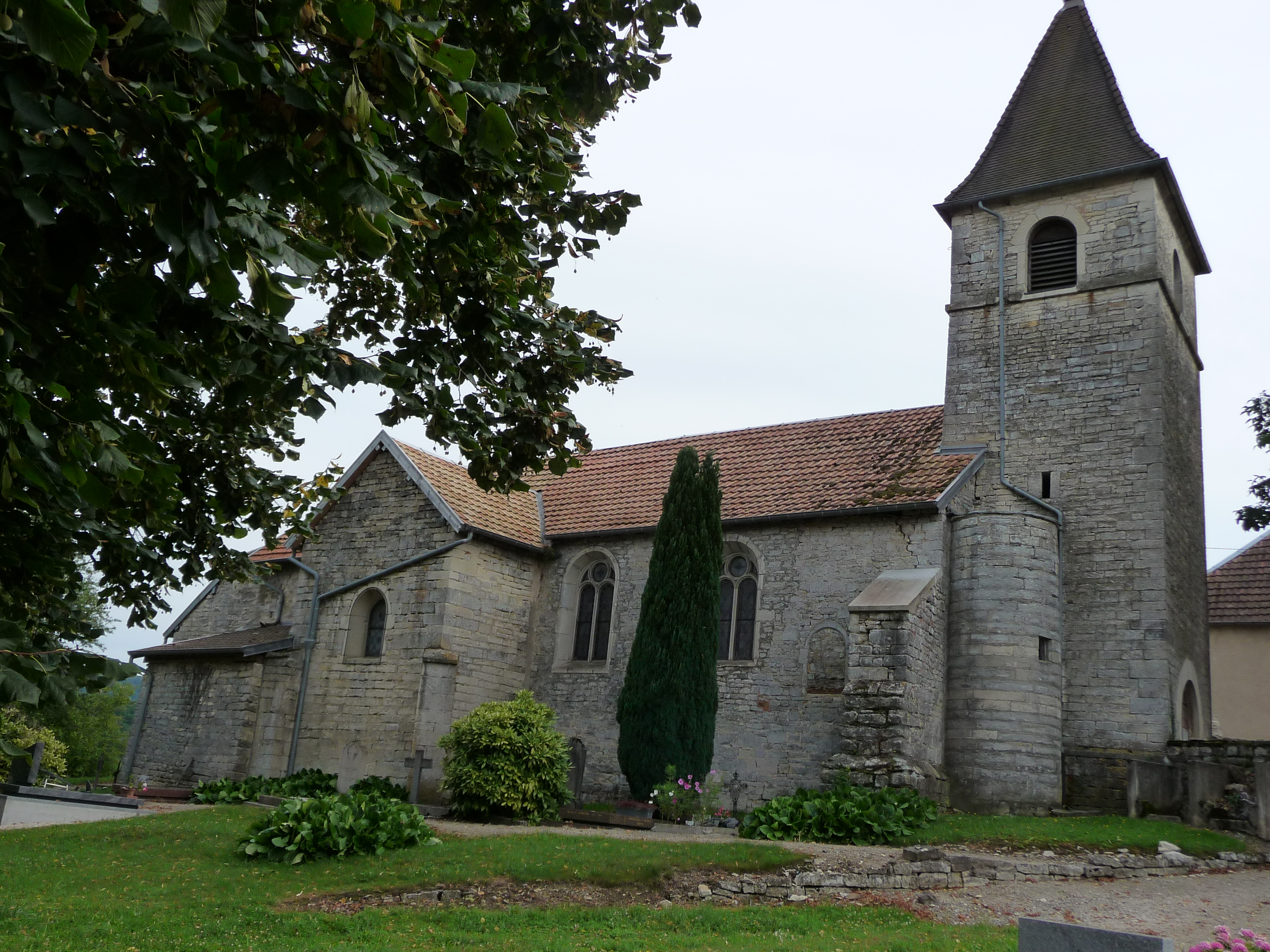 L'église de Villars-Saint-Georges dans le Doubs (de 1145 à 1884)